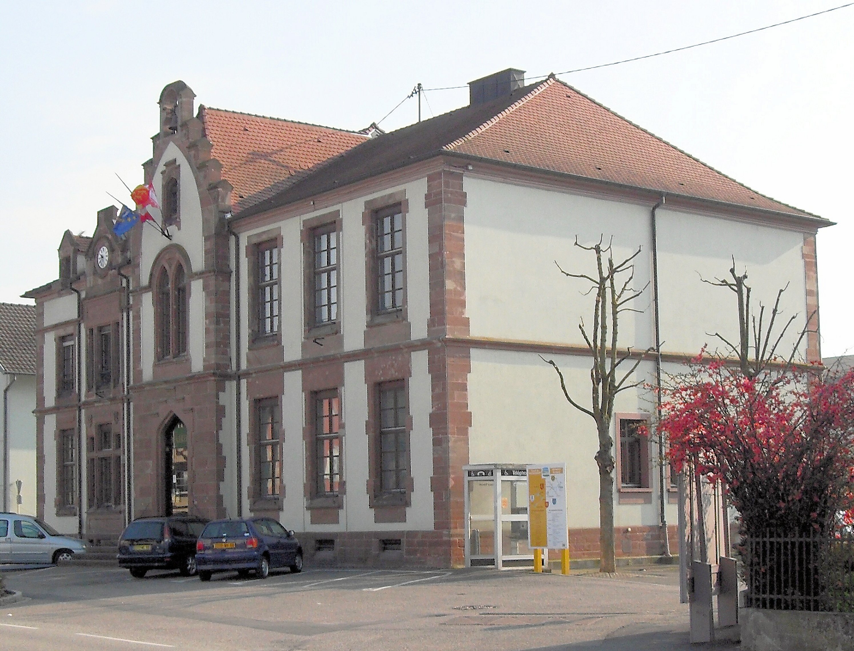 La mairie de Bartenheim